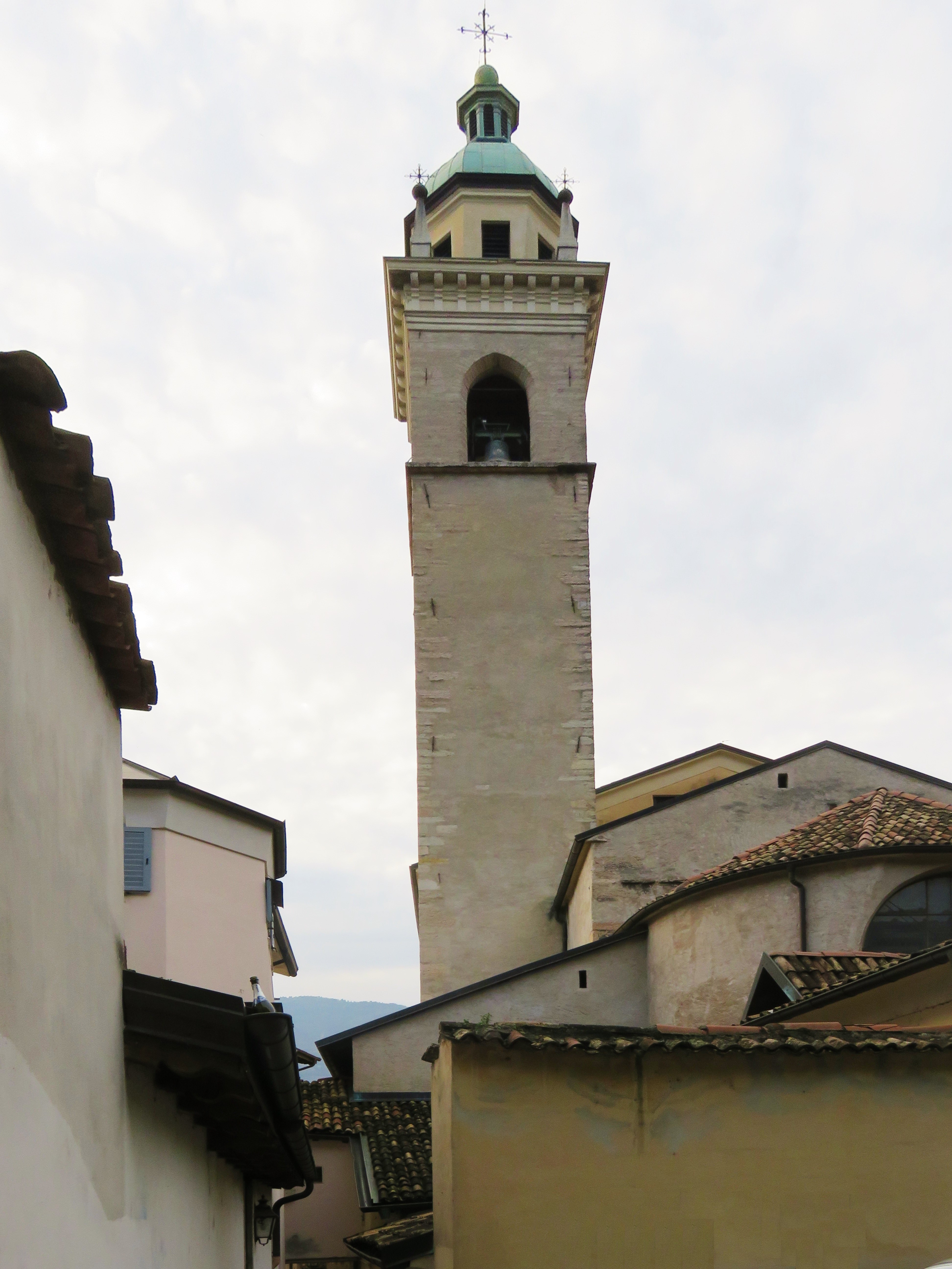 Campanile all'imbocco di vicolo di san Giuseppe, dalle mura cittadine